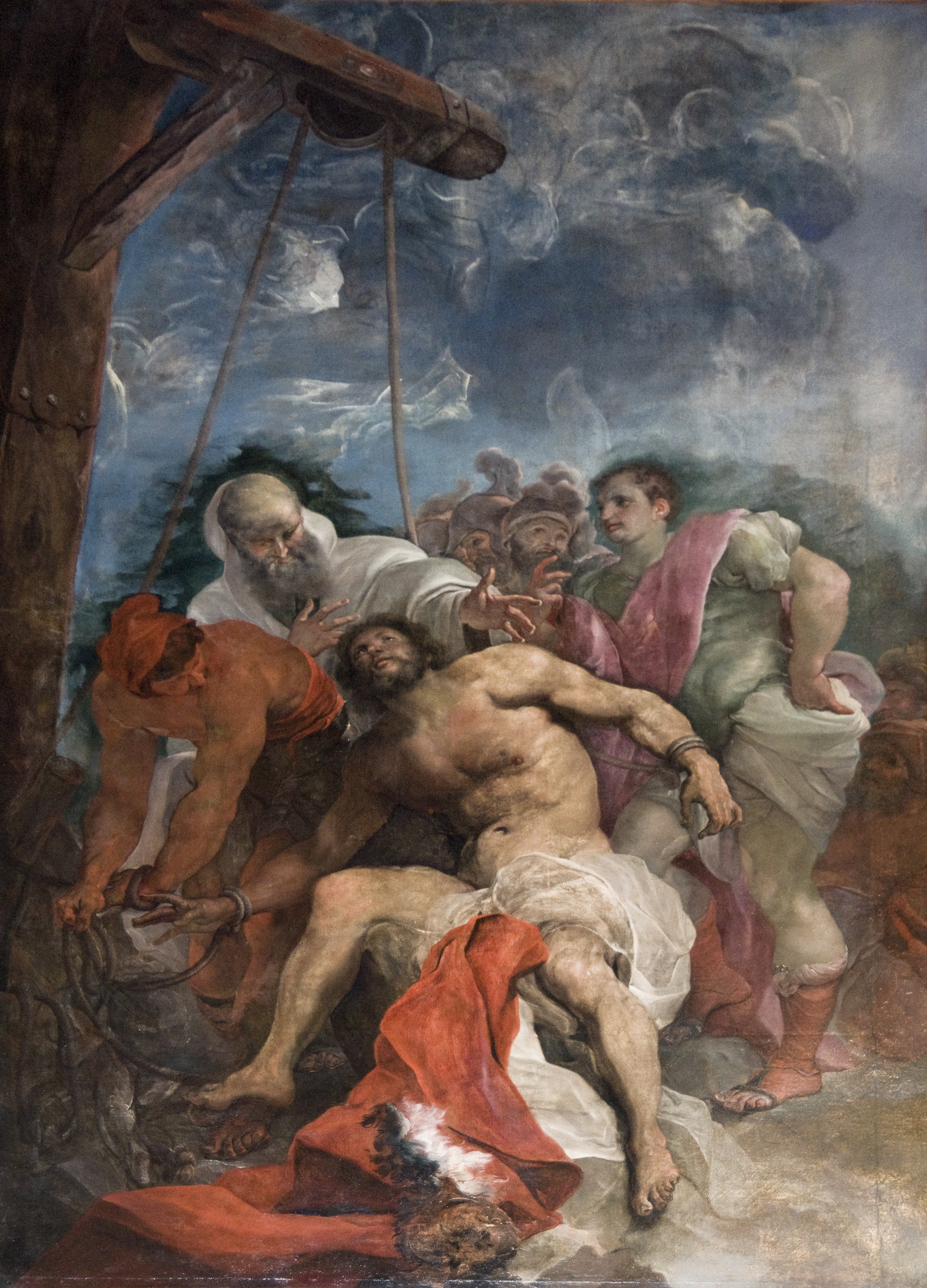 Paolo Pagani, Il martirio di San Vitale.